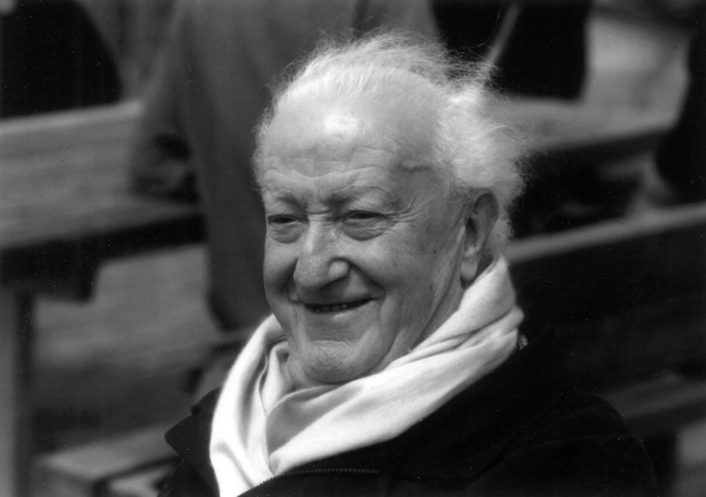 Attilio Prevost Jr. nel novembre del 2007